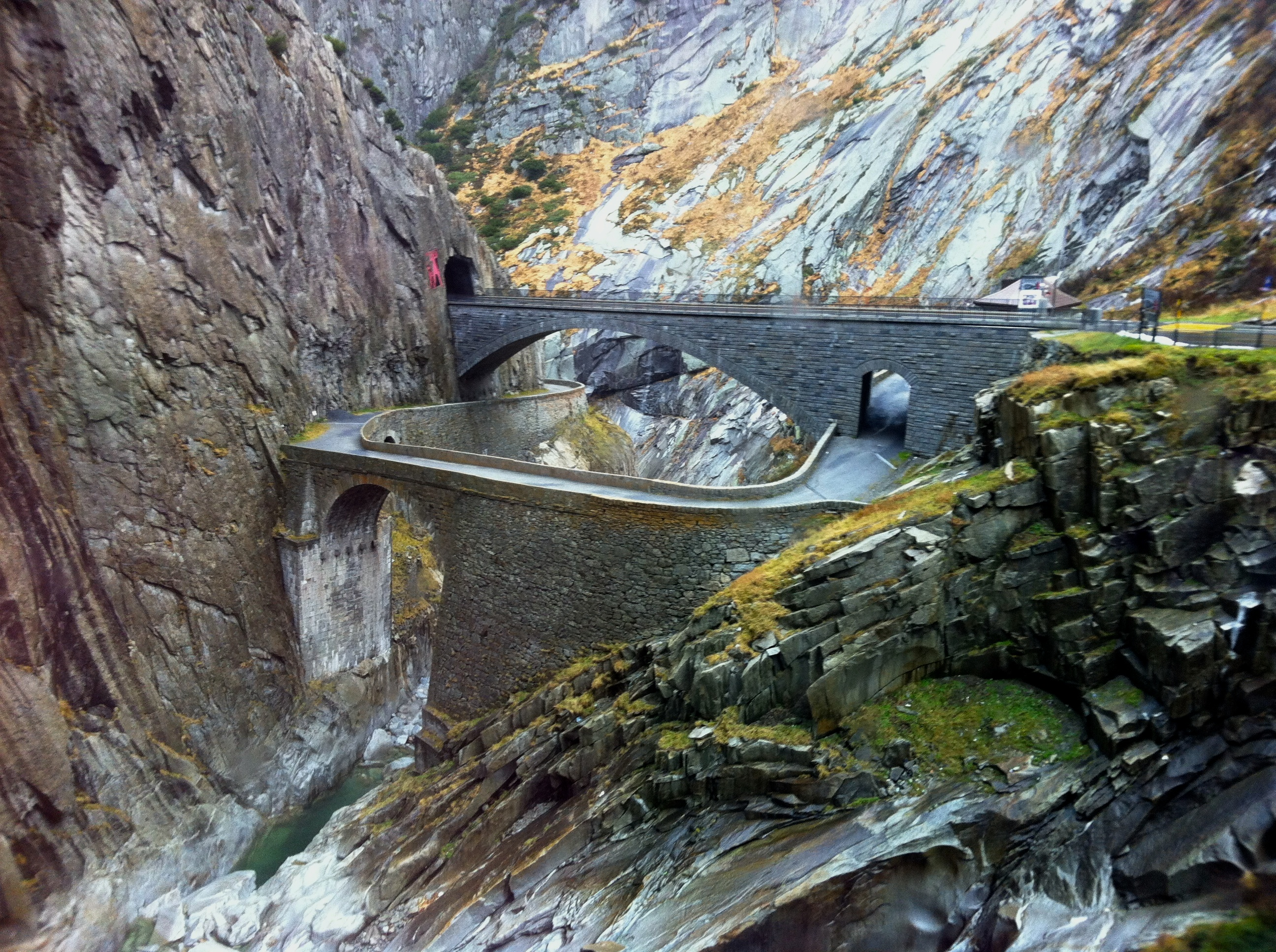 Teufelsbrücke